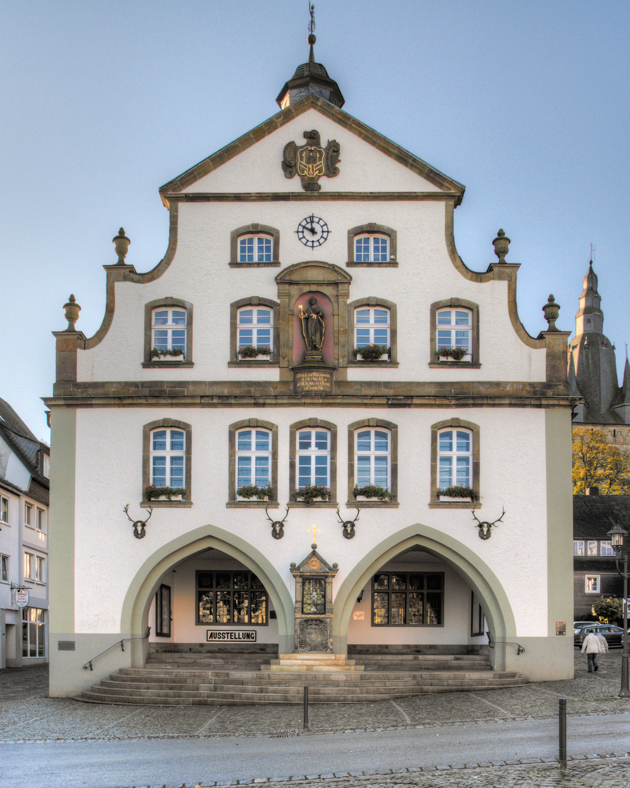 Vorderansicht des Rathauses von Brilon.